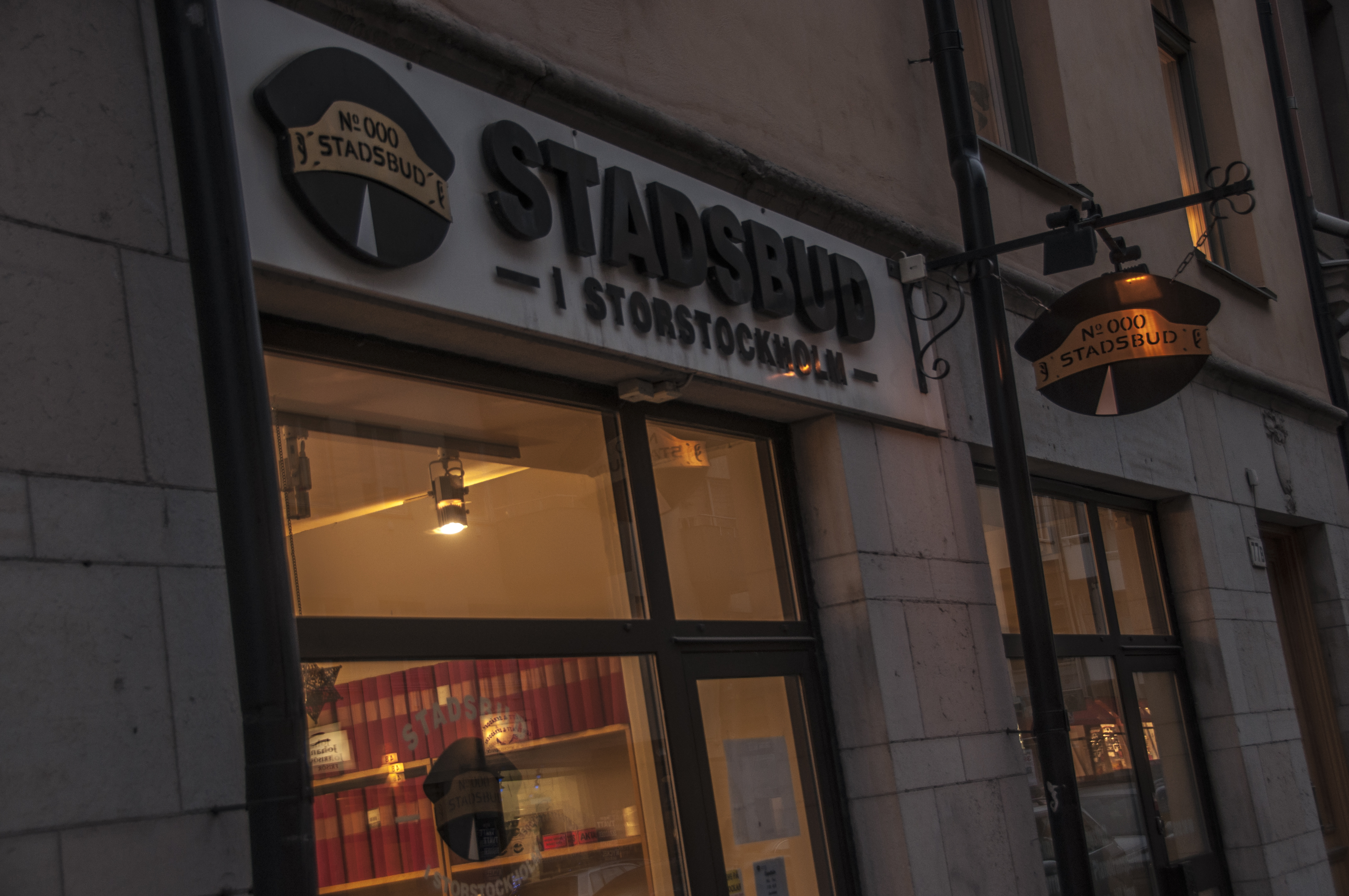 Stockholms Stadsbud, Döbelnsgatan 77